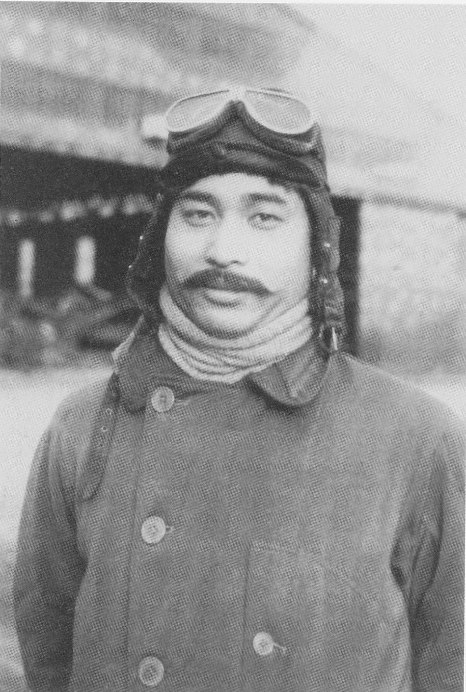 1938年、空母「蒼龍」乗組の一空曹時代。